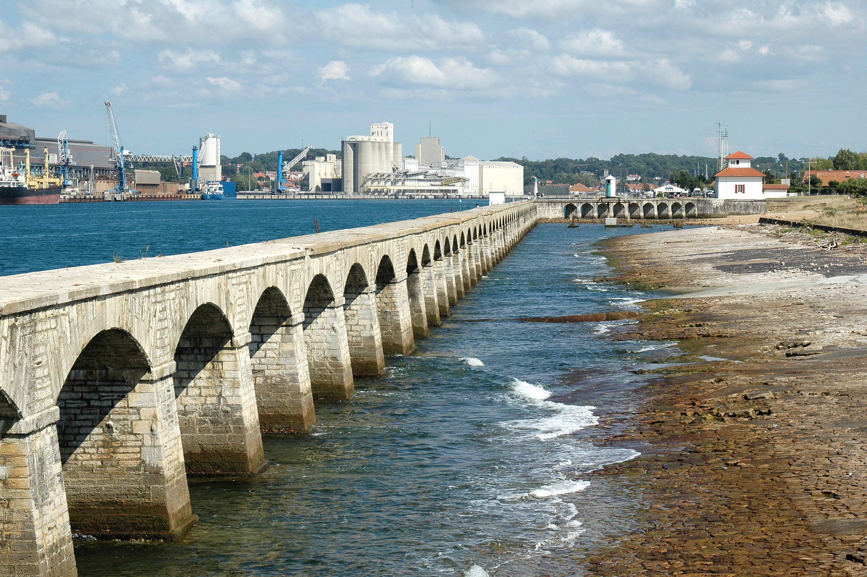 Bayonne, le port. Photo prise le 19/08/06 par Harrieta171